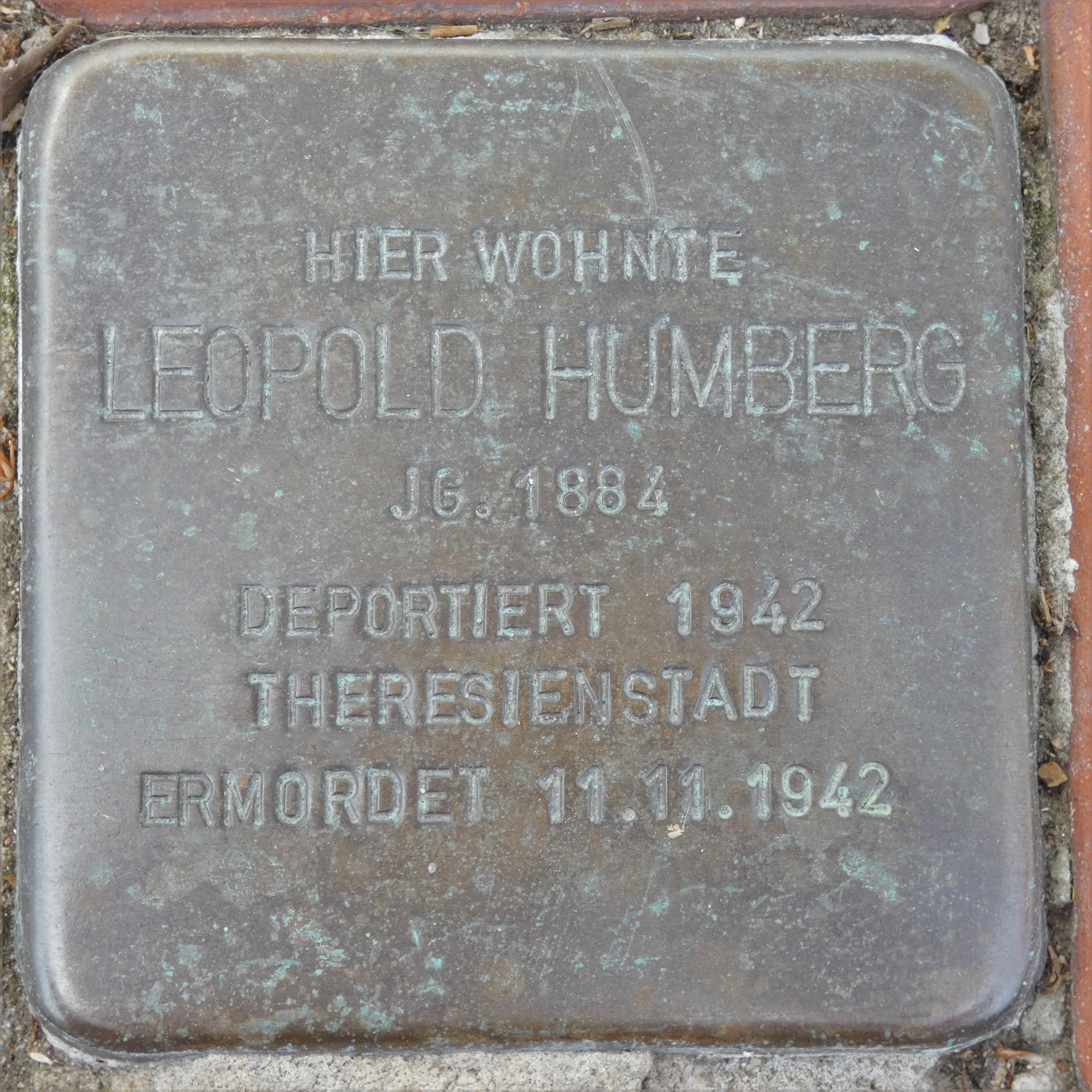 Hier wohnte Leopold Humberg, Jg. 1884, deportiert 1942, Theresienstadt, ermordet 11.11.1942